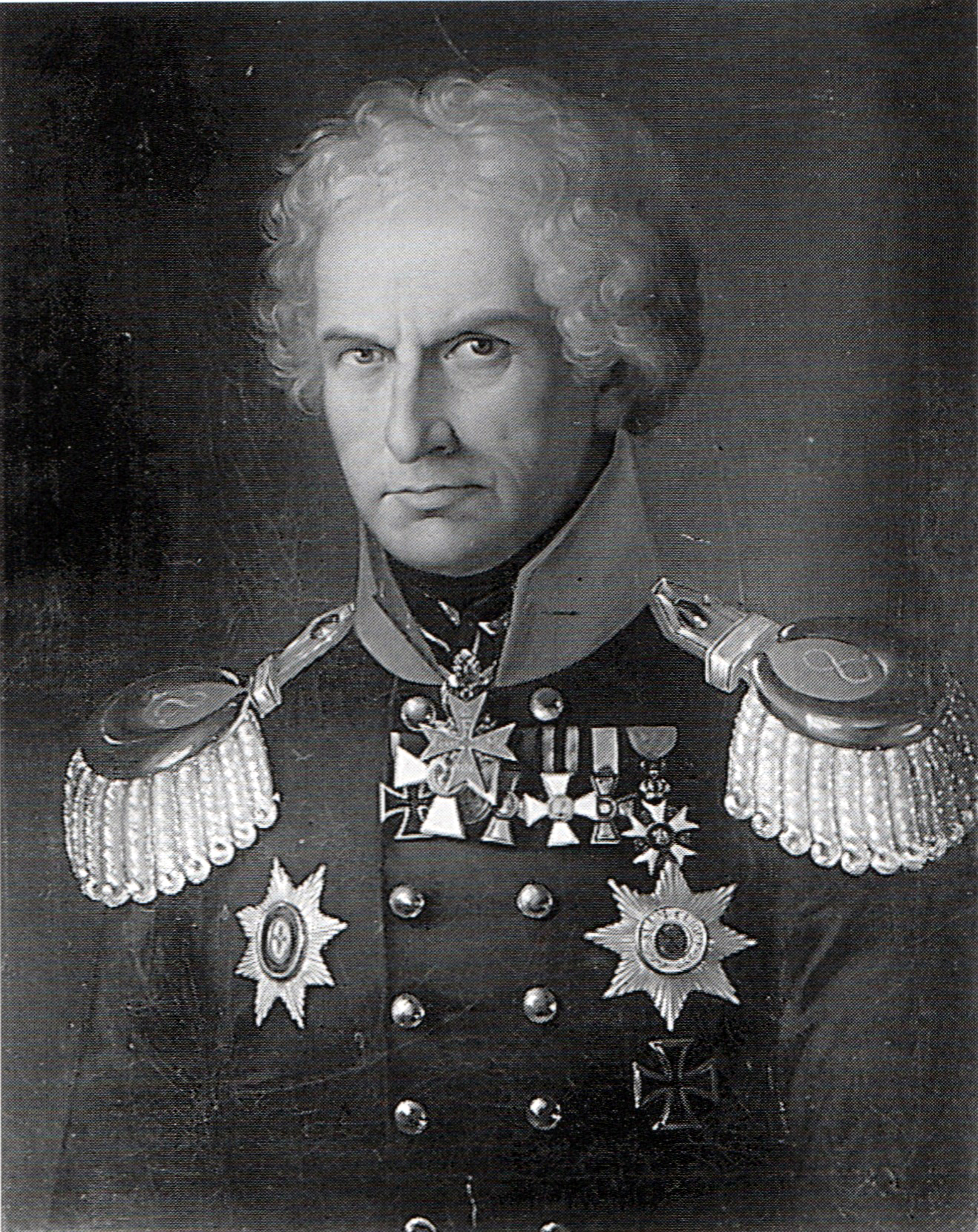 Ölgemälde von Generalleutnant Wilhelm von Horn, früher im Schloss Königsberg.